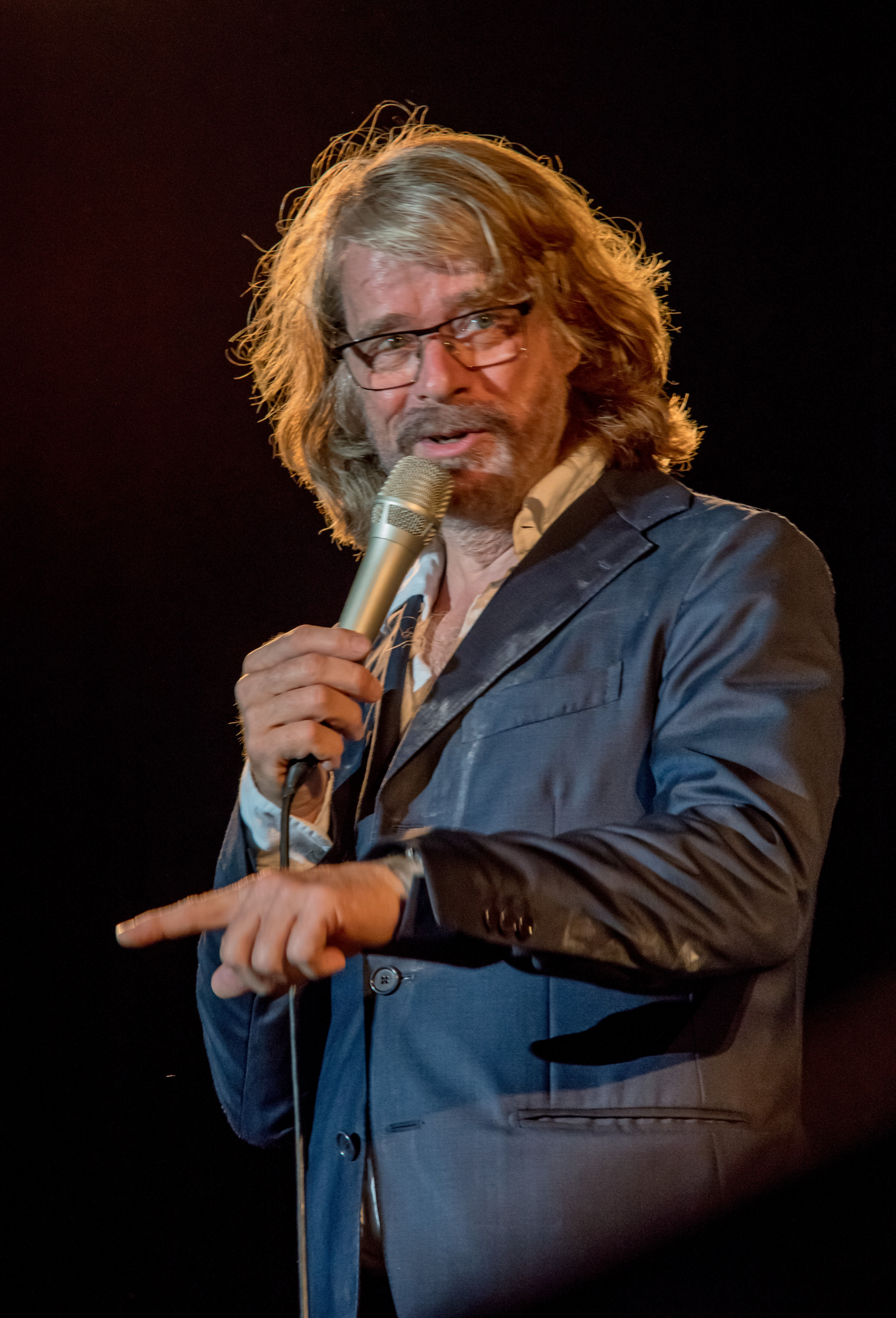 Bilder vom Zelt Musik Festival 2017 in Freiburg im Breisgau Helge Schneider am 10.07.2017